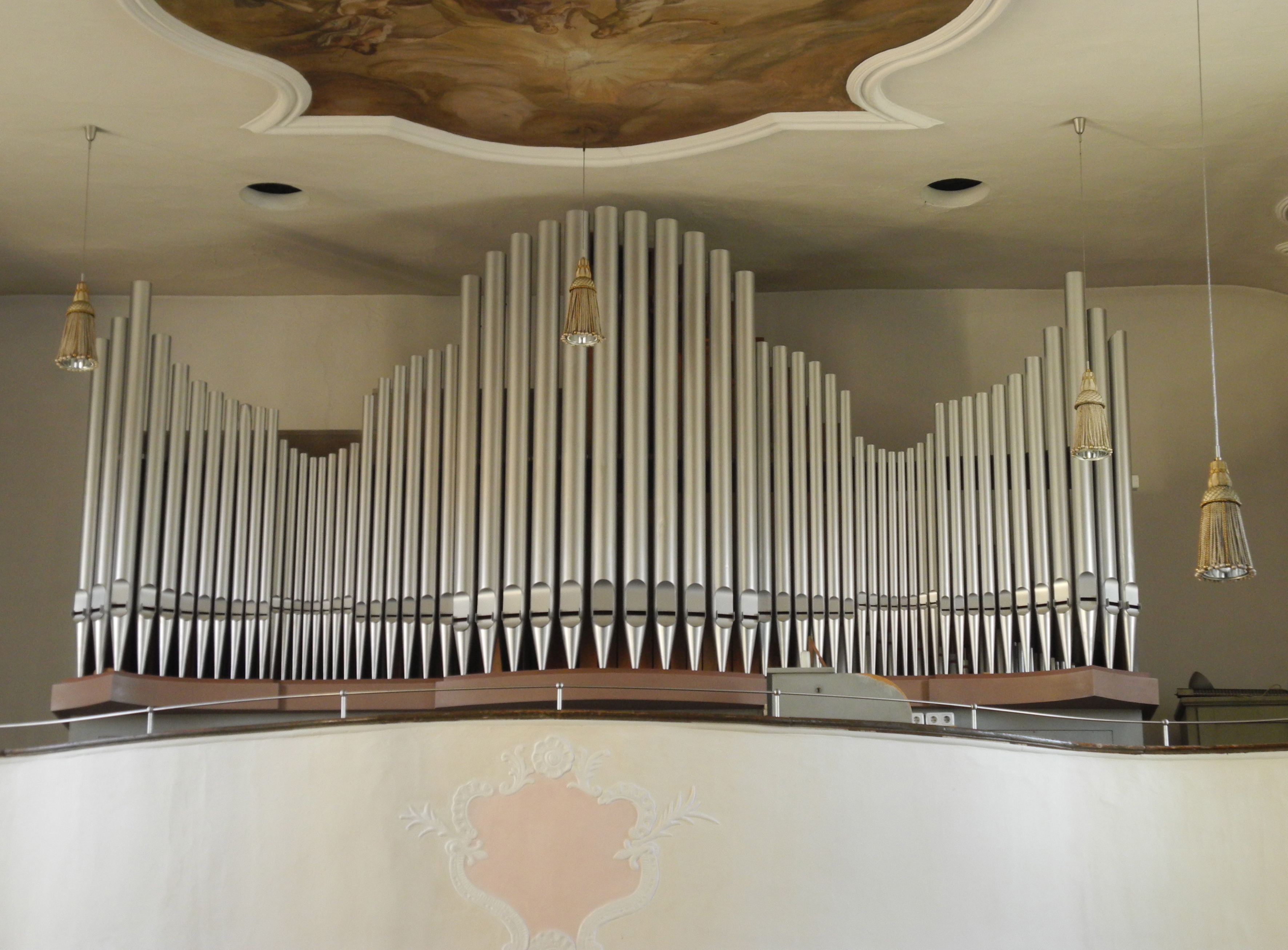 Freipfeifenprospekt, Schwellwerk.